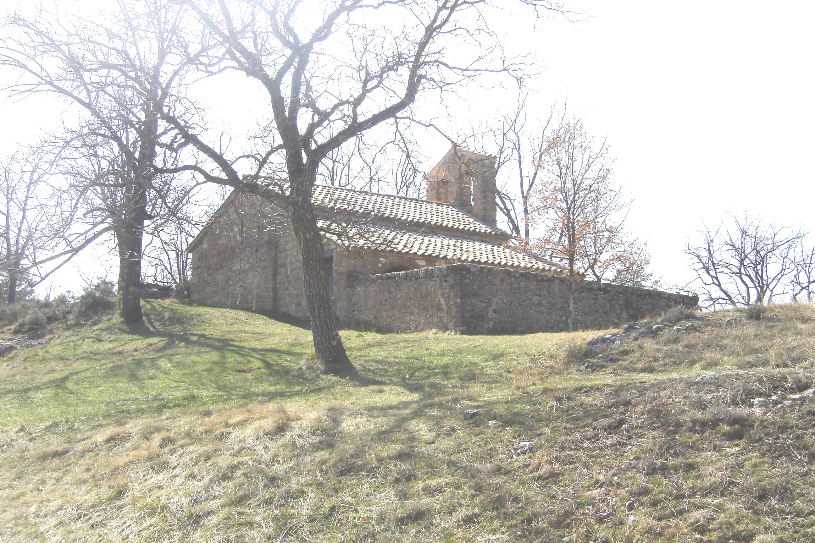 L'ermita de Sant Lleïr de Casabella, al municipi de La Coma i la Pedra, a la Vall de Lord (Solsonès) des del costat dord-oriental.